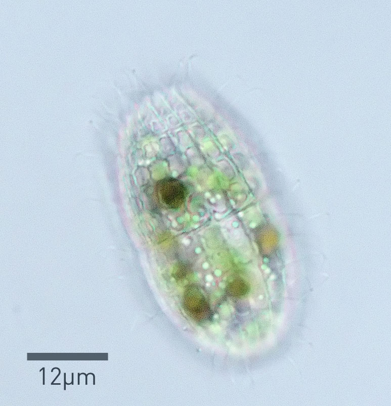 Das Tonnentierchen Coleps hirtus viridis